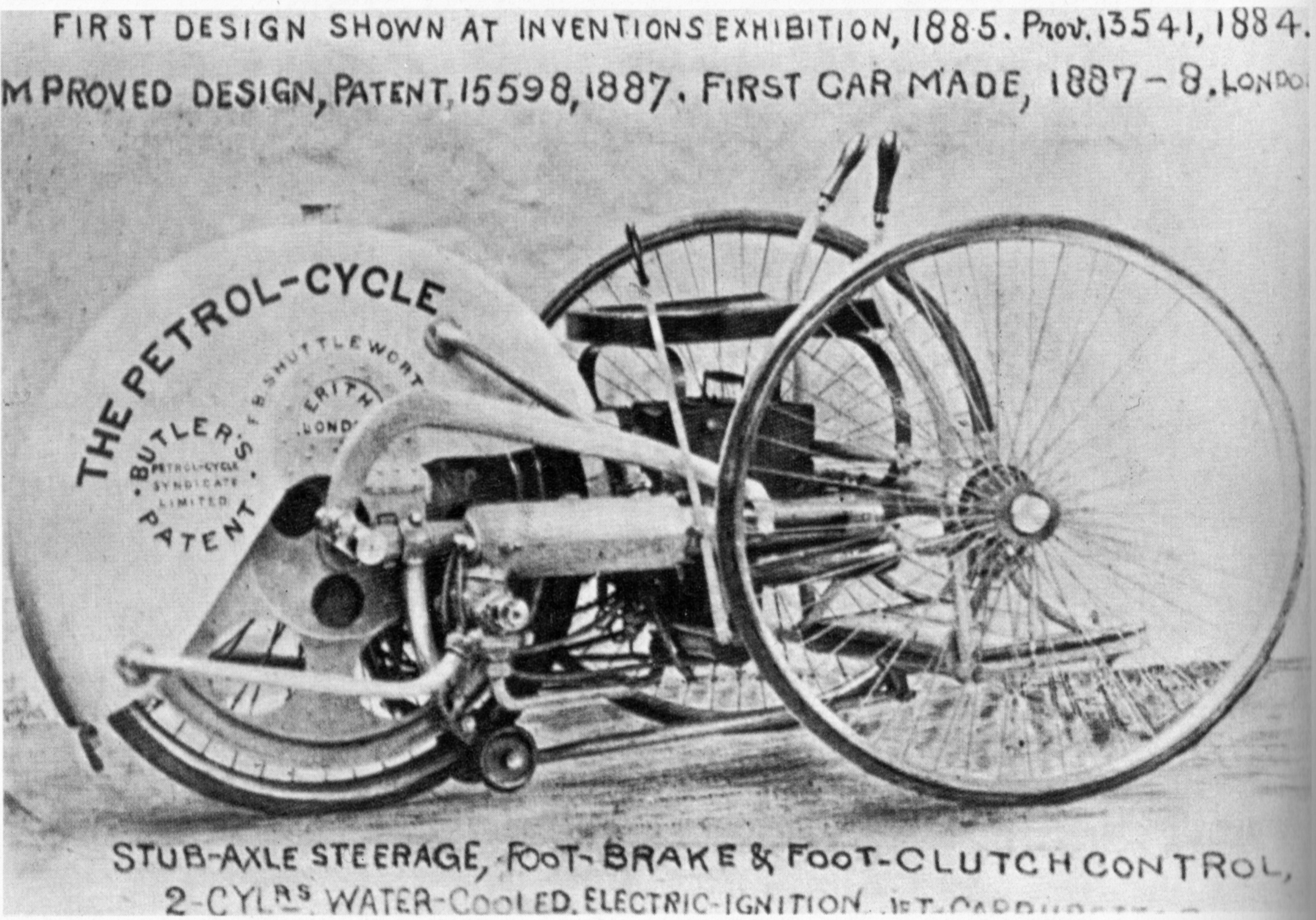 Butler Dreirad aus dem Jahr 1887. Diese Dreirad wurde 1885 von Edward Butler entworfen und 1887 konstruiert.